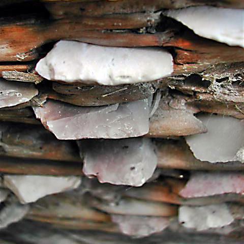 Trillo español, detalle cerrado de las lascas de sílex